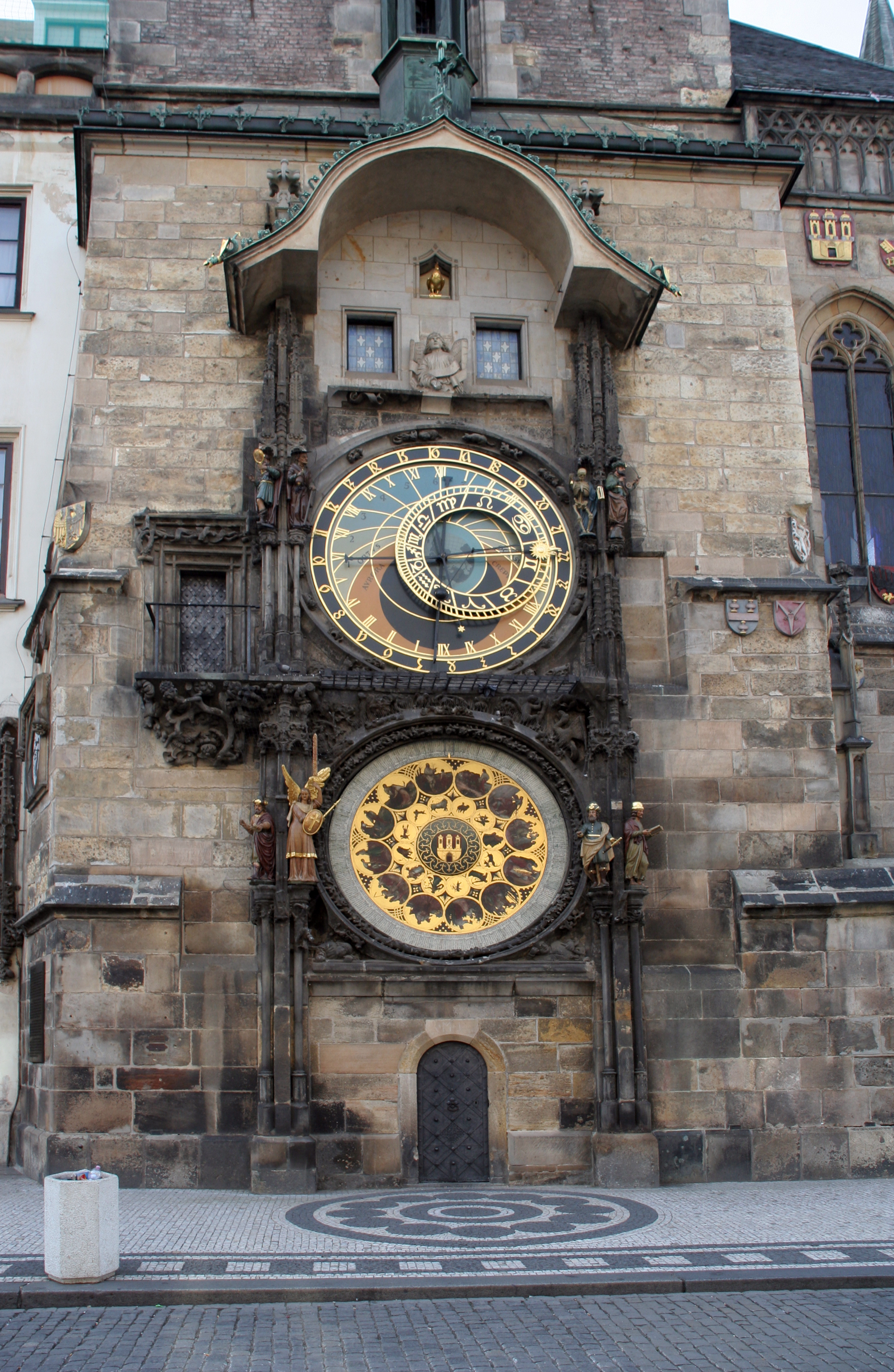 Astronomical Clock